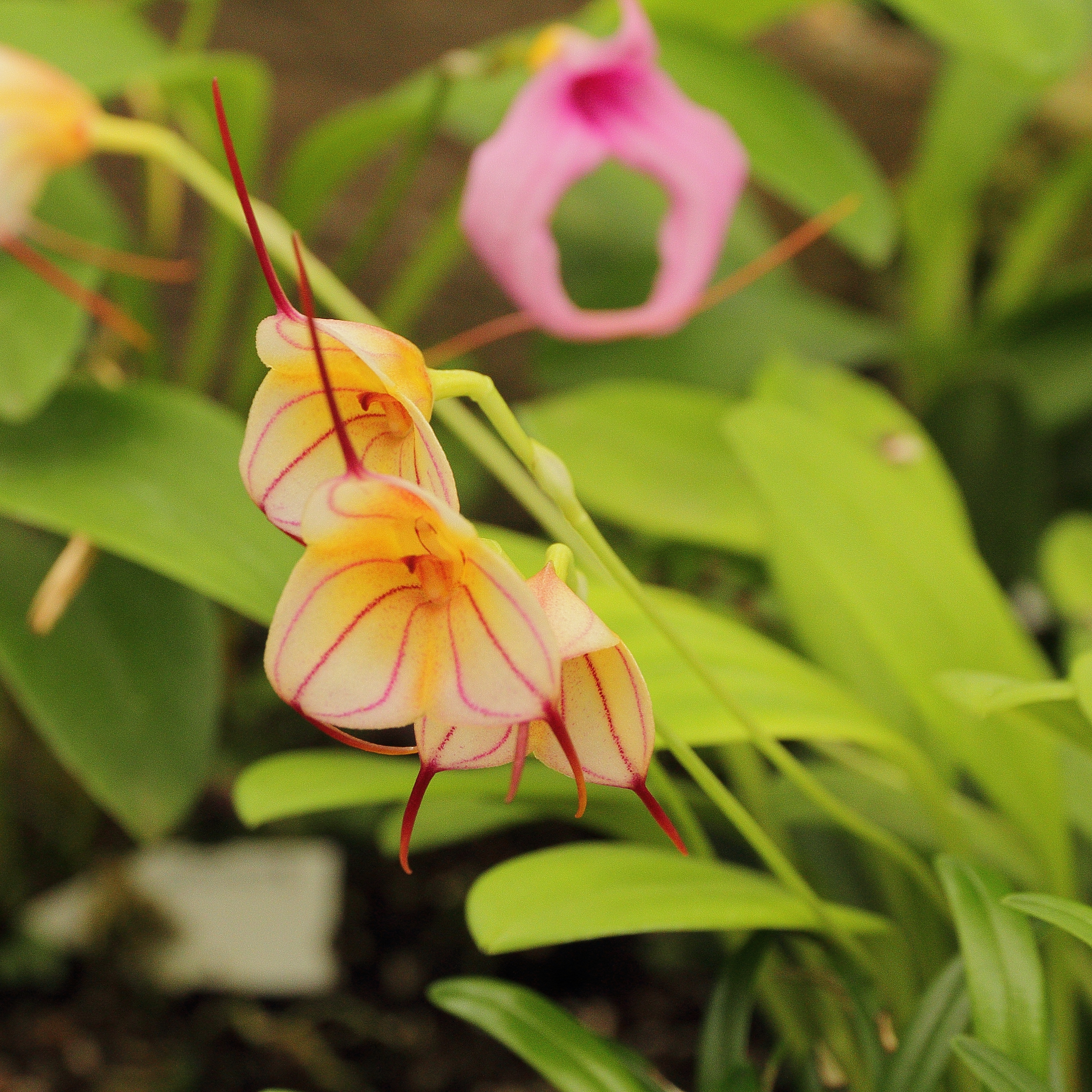 Masdevallia sp.